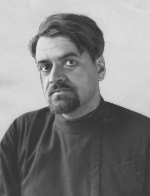 Ksiądz archimandryta, zastępca profesora na Studium Teologii Prawosławnej Uniwersytetu Warszawskiego Grzegorz Peradze.